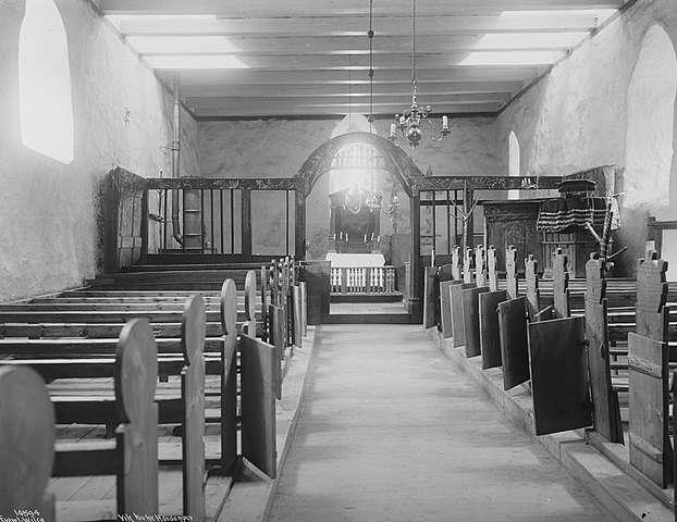 Eidfjord gamle kyrkje invendes. Kyrkja er etter tradisjonen frå 1309. Korskiljet er eldre, og såleis truleg overflytt frå ei tidlegare kyrkje.